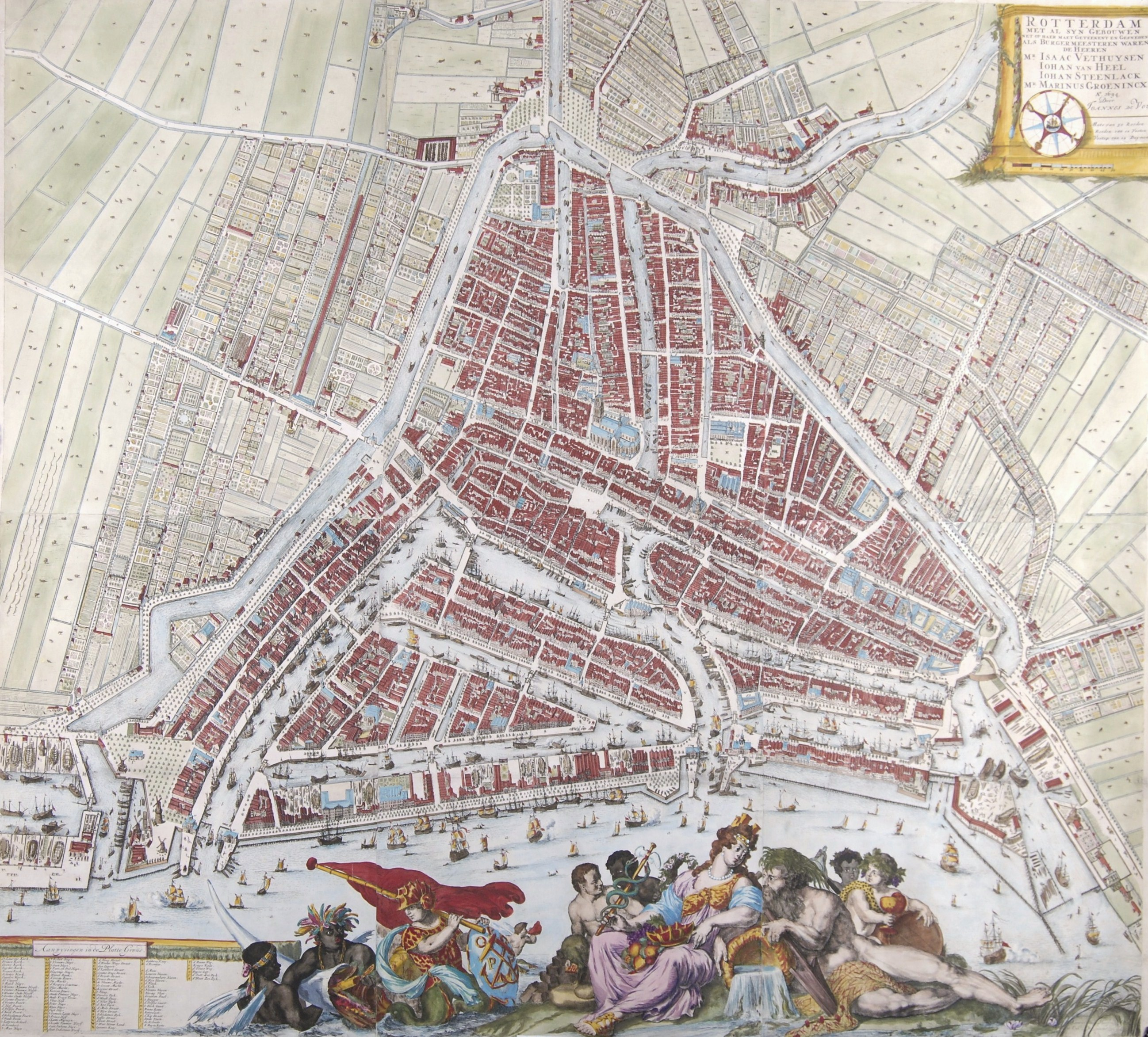 “Rotterdam met al syn gebouwen, net op haer maet geteekent en gesneden”. Ets en kopergravure gedrukt op 6 bladen, vervaardigd door Johannes de Vou en Romeijn de Hooghe in 1694